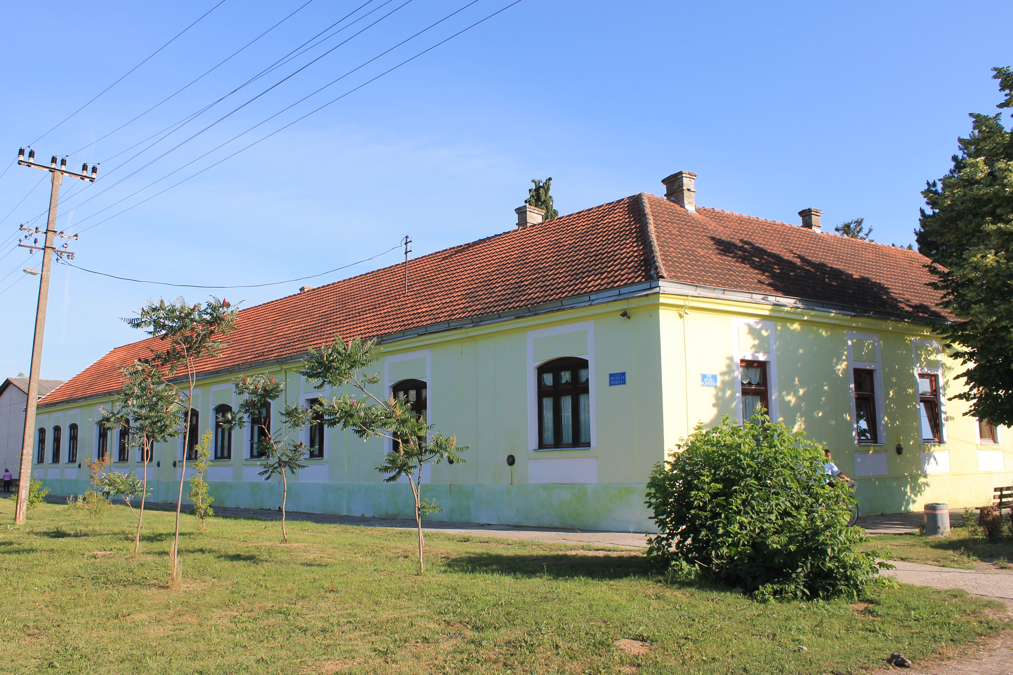 Nikinci